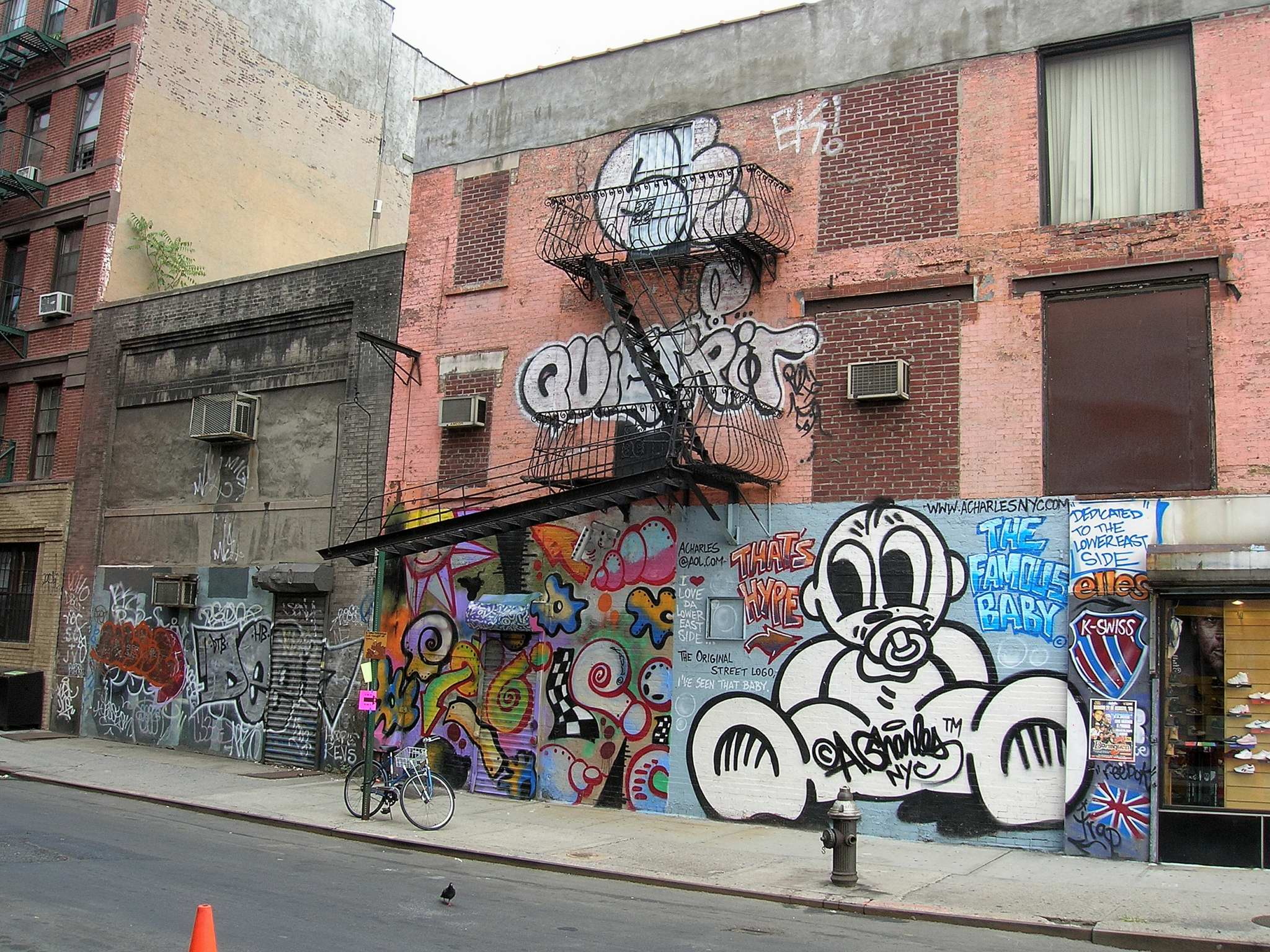 Graffiti, Lower East Side, NYC